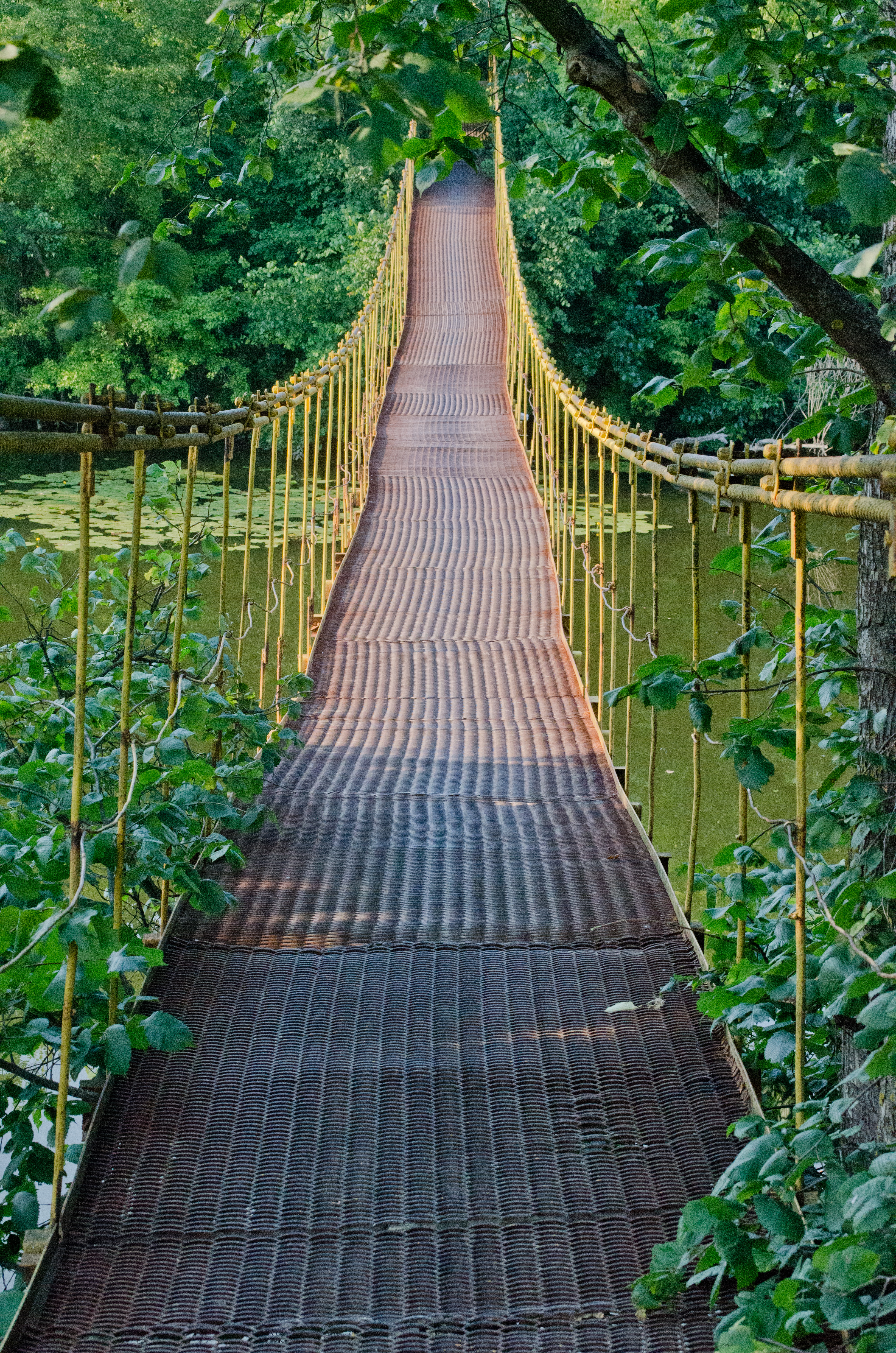 Підвісний міст через річку Рось у селі Чмирівка.